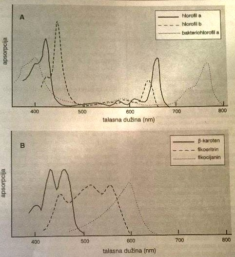 A - hlorofil a, hlorofil b i bakteriohlorofil a B - β-karoten, fikoeritrin i fikocijanin